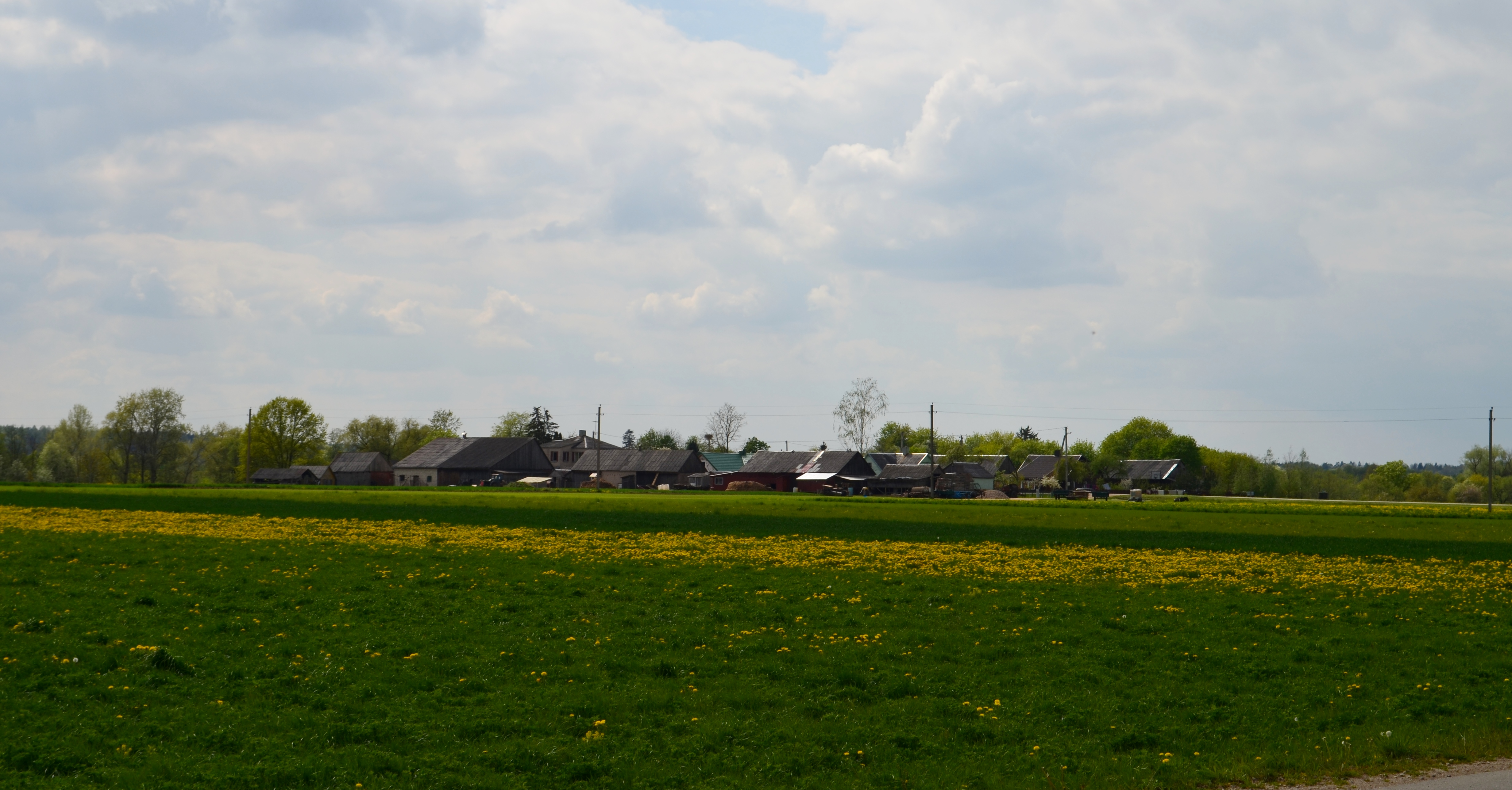 Jotyškiai, Šakių raj.